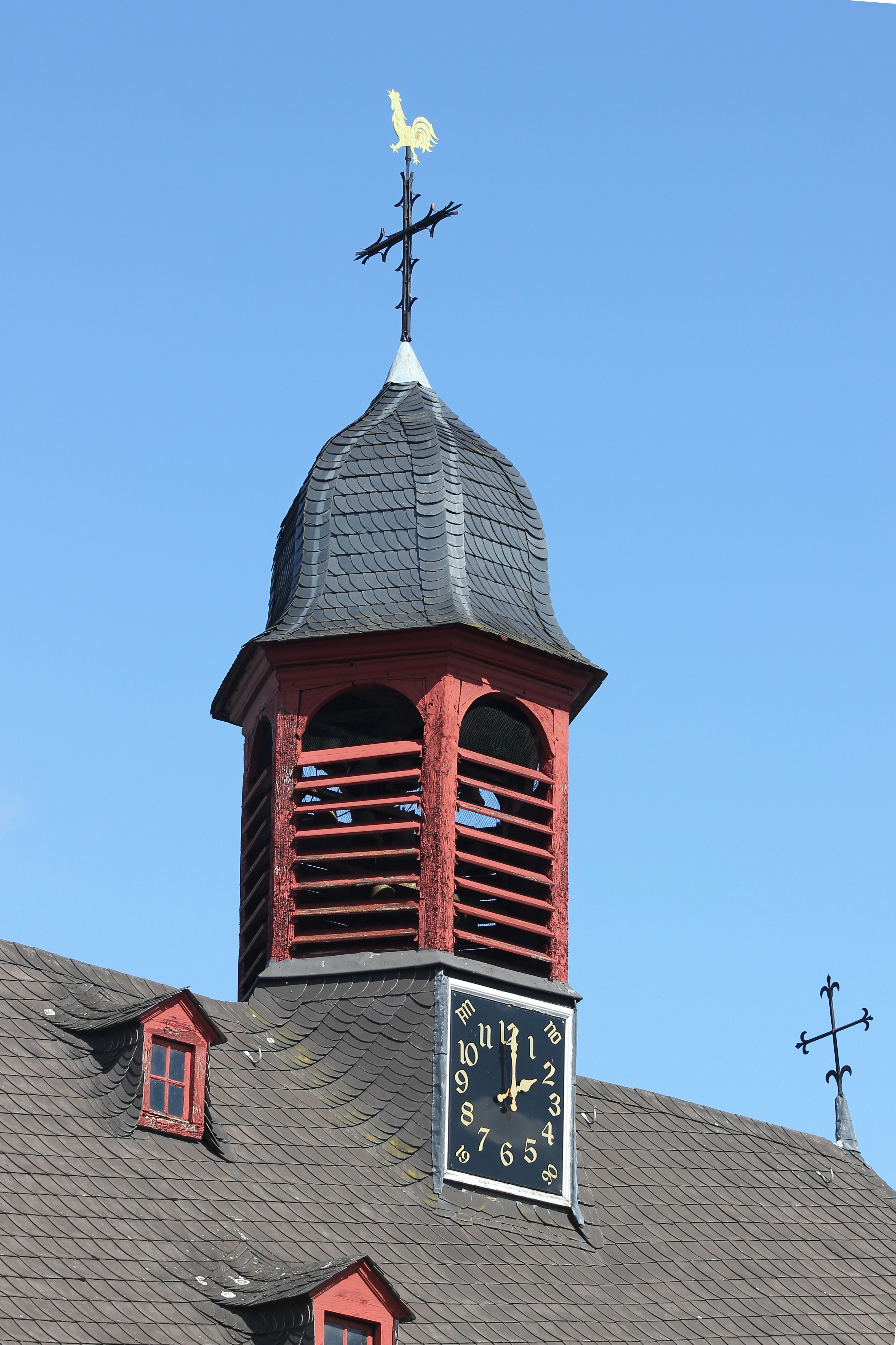 Später aufgesetzter Dachreiter der Alten Kapelle aus dem frühen 14. Jahrhundert in Mülheim-Kärlich mit einem Glockenspiel von 1962